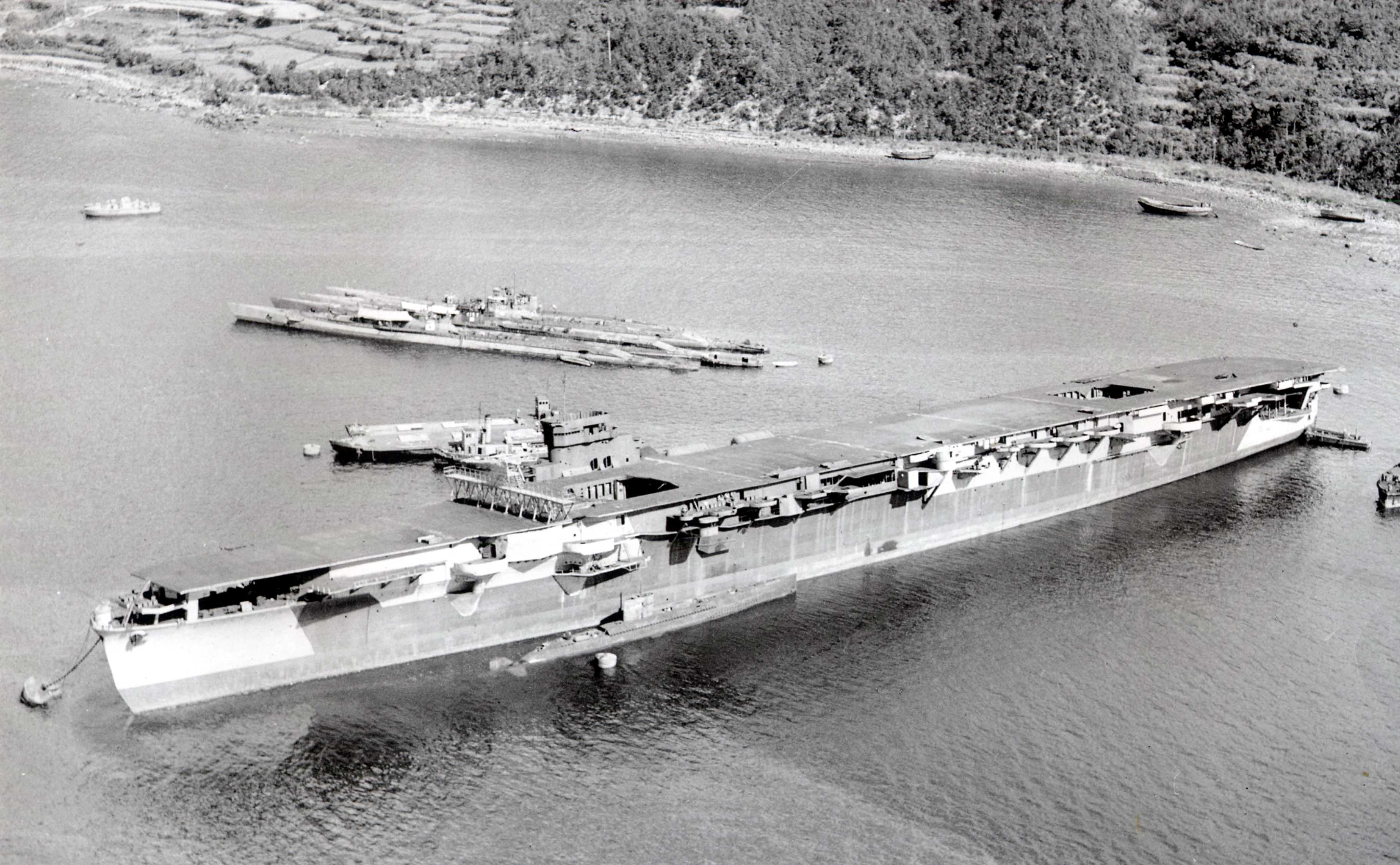 日本海軍航空母艦雲龍型「笠置」